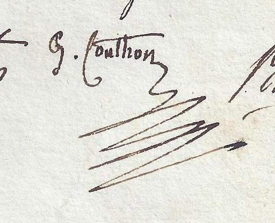 Signature Autograph , Georges Couthon guillotined with Robespierre